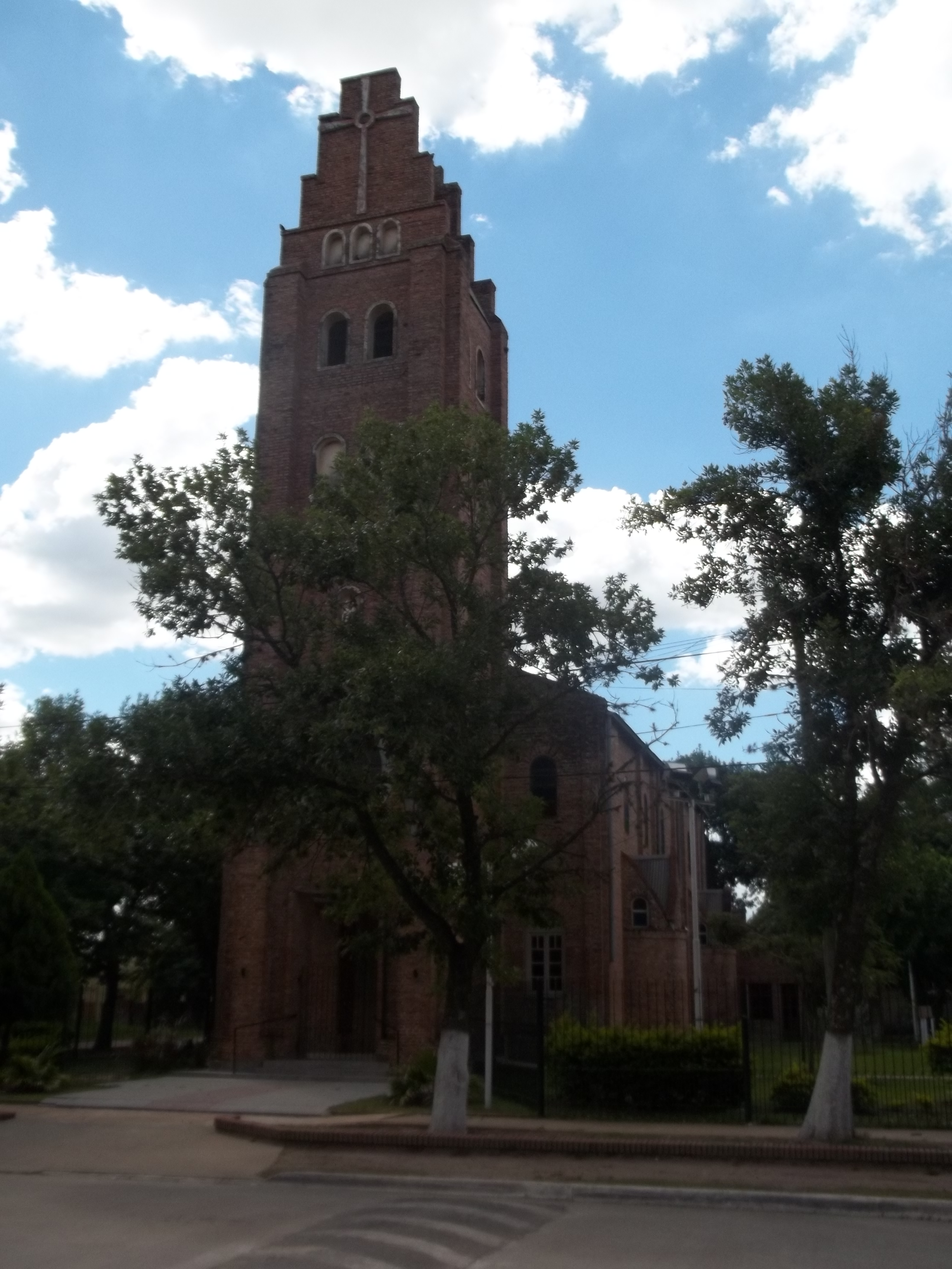 Vista del frente de la capilla de Makallé, tomada desde la plaza principal.